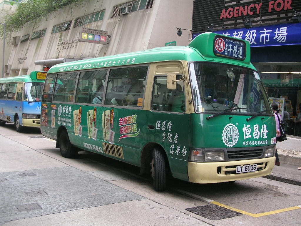 中文（香港）: 香港島專線小巴45A線，主要方便半山區的居民到西營盤、正街街市買菜。